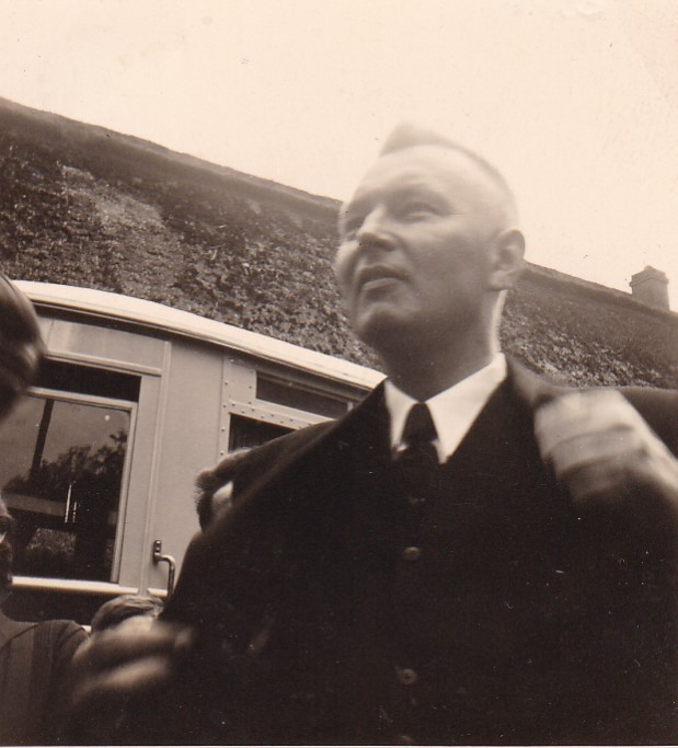 Fotografie des Lehrers Walter Zimmermann (1892–1968)